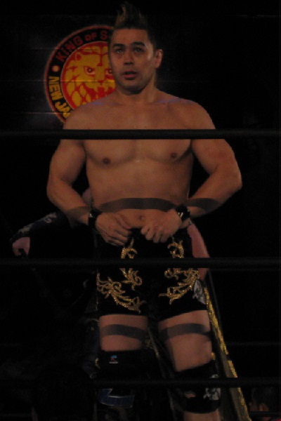 2014年9月21日 神戸ワールド記念ホール 「DESTRUCTION in KOBE」 TAKAみちのく